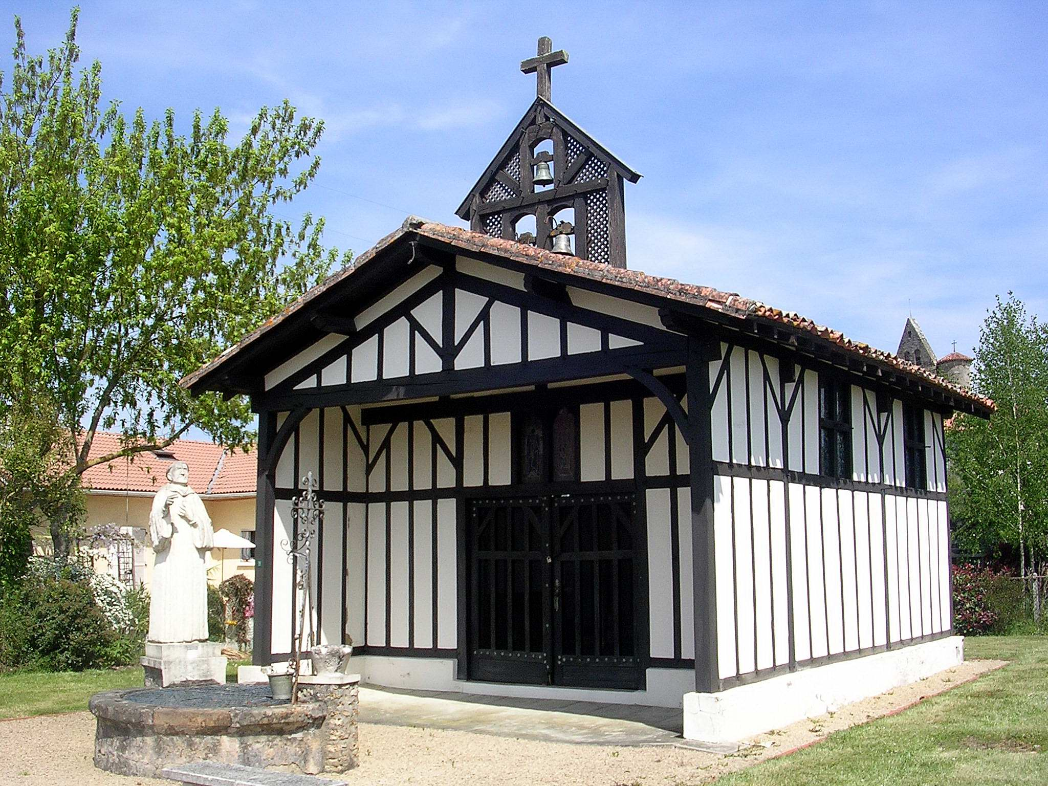 Chapelle saint-Amand et sa source à Bascons, dans le département français des Landes.